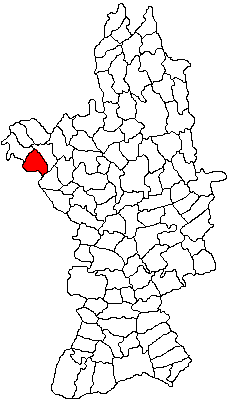 Categorie:Hărţi ale judeţului Olt